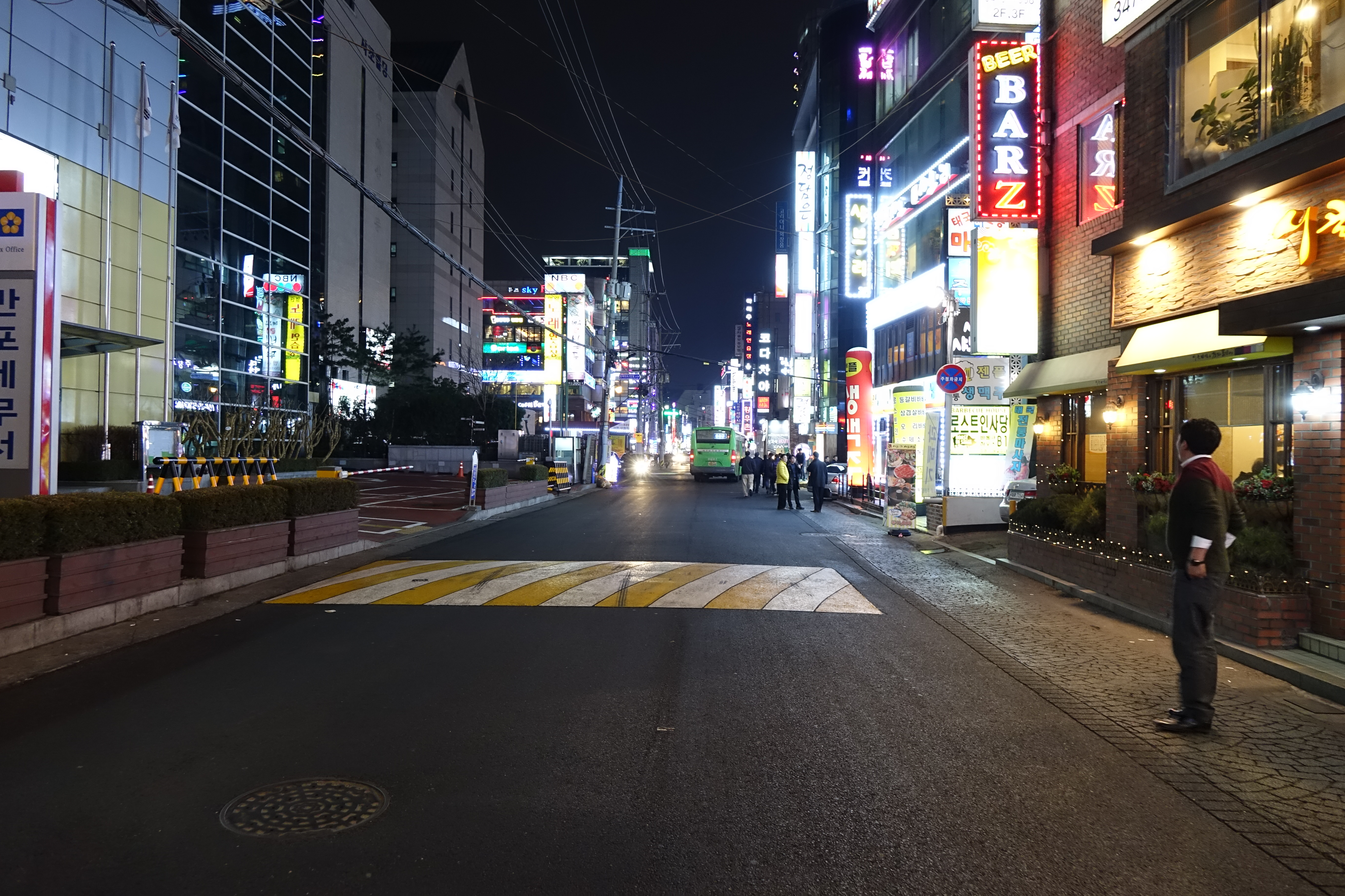 2015년 1월 27일 최광모 촬영